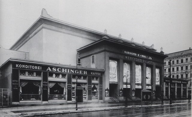 Der Mercedespoalast im Ortsteil Neukölln, Berliner Bezirk Neukölln bestand als Kinospielstätte zwischen 1927 und nach Umbauten und Kriegsschäden bis 1969 mit der Adresse Hermannstraße 214. Das Gebäude wurde abgerissen.